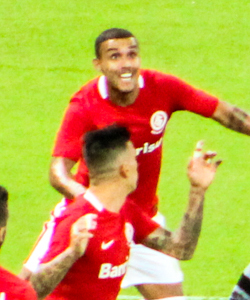 Inter X ABC pelo Campeonato Brasileiro da Série B 2017